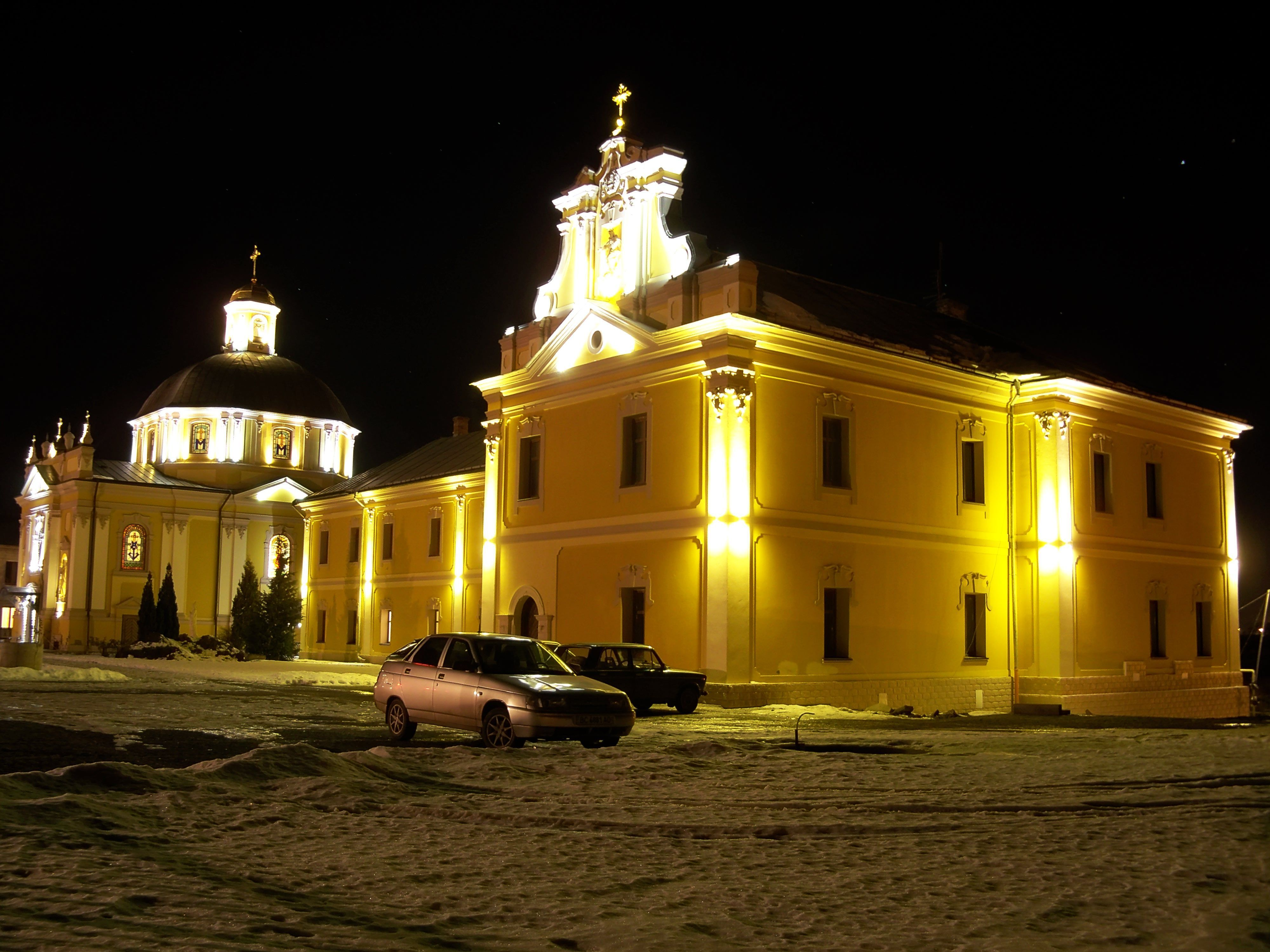 Василіянський монастир (мур.), Червоноград, вул.Б.Хмельницького, 21